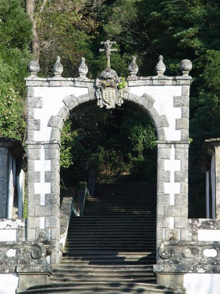 Portico in Bom Jesus, Braga, Portugal